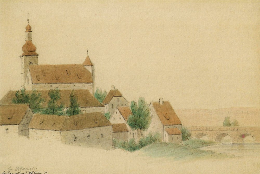 Klosterkirche Frauenaurach (St. Matthäus) bei Erlangen